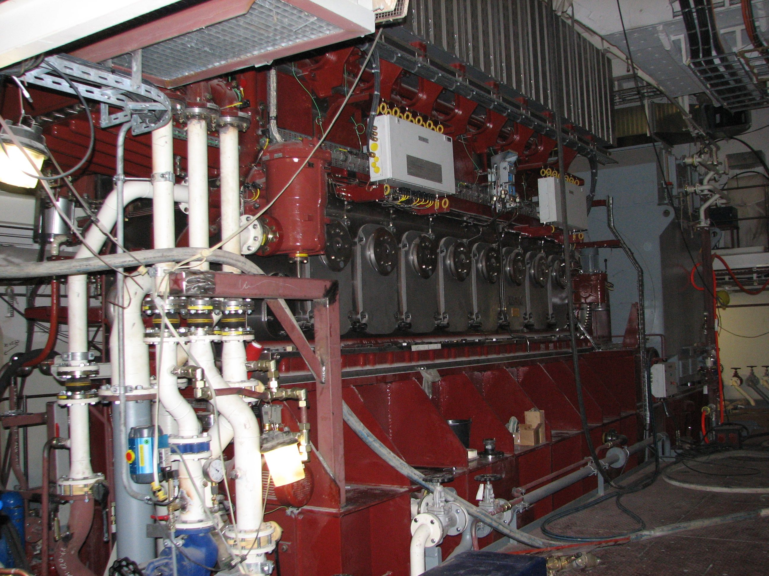 Flensburger Schiffbau Gesellschaft